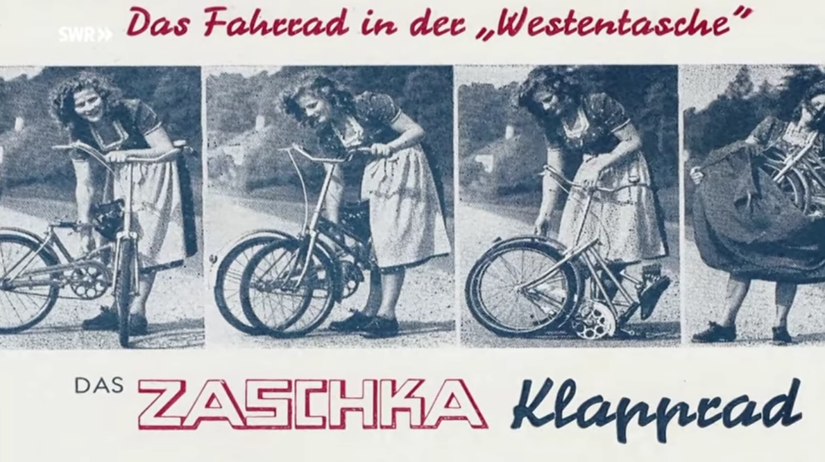 Zaschka Klapprad / Zaschka Faltrad aus den 1930er bzw. 1950er Jahren (Erfinder: Engelbert Zaschka)